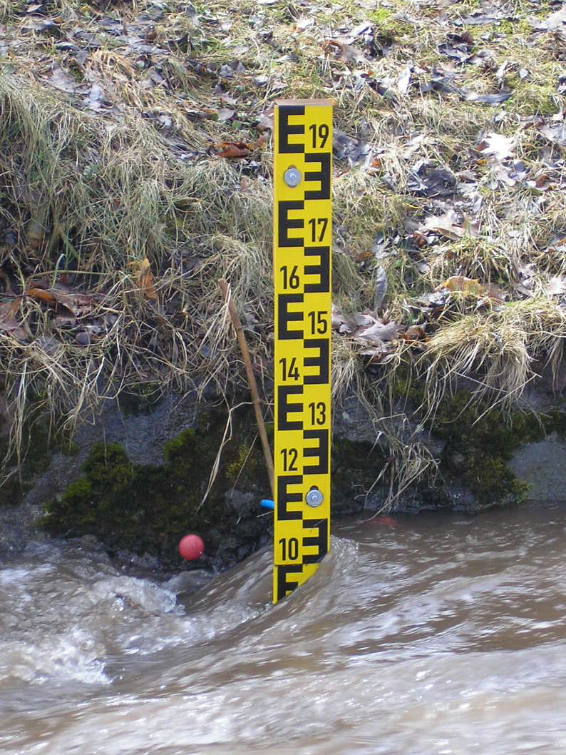 Pegel beim Ilmhochwasser am 31. März 2006 an der Lackfabrik (B88 / Langewiesener Straße). Höhe: etwa 1,05 Meter (normal etwa 25 cm).